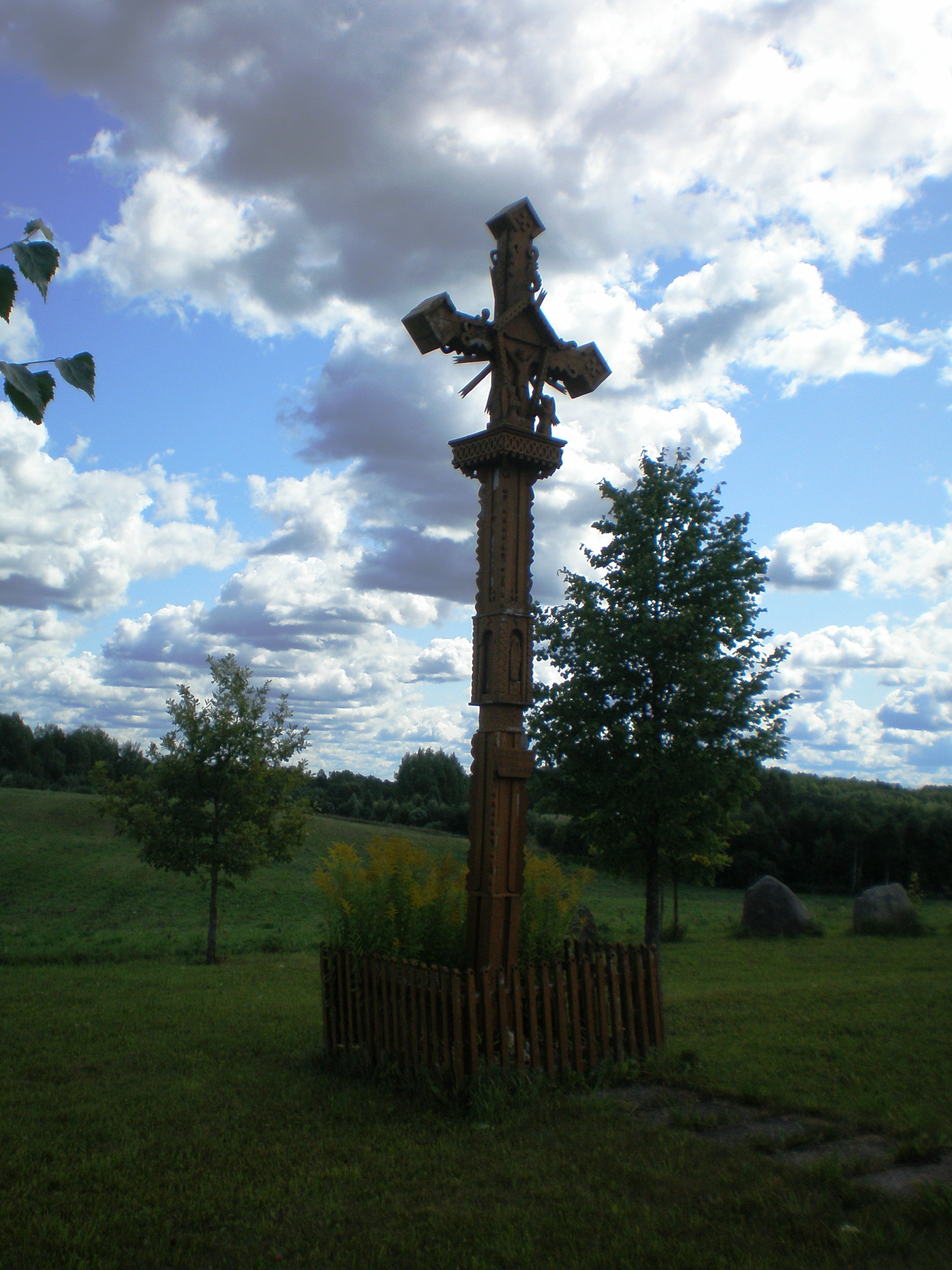 Vaičėnai, Rokiškio raj., Lietuva